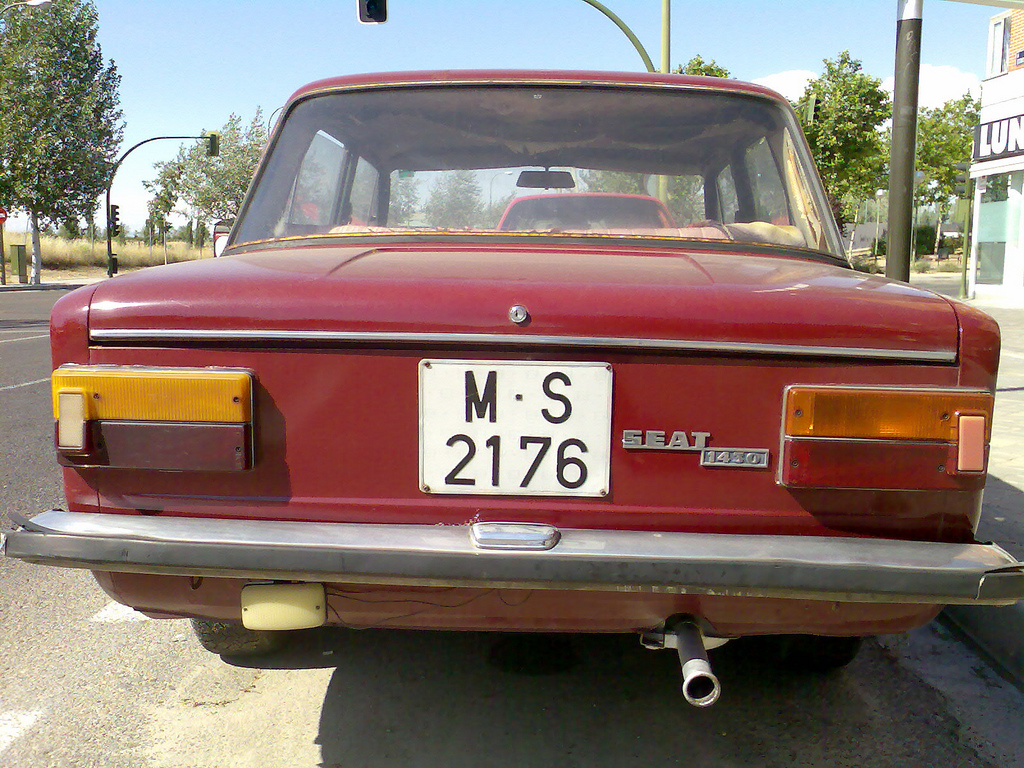 SEAT 1430 años setenta